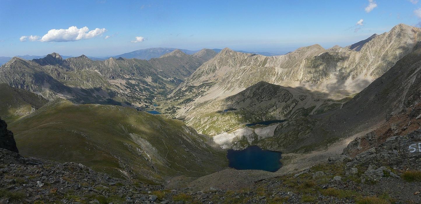 Vallé de la Carança